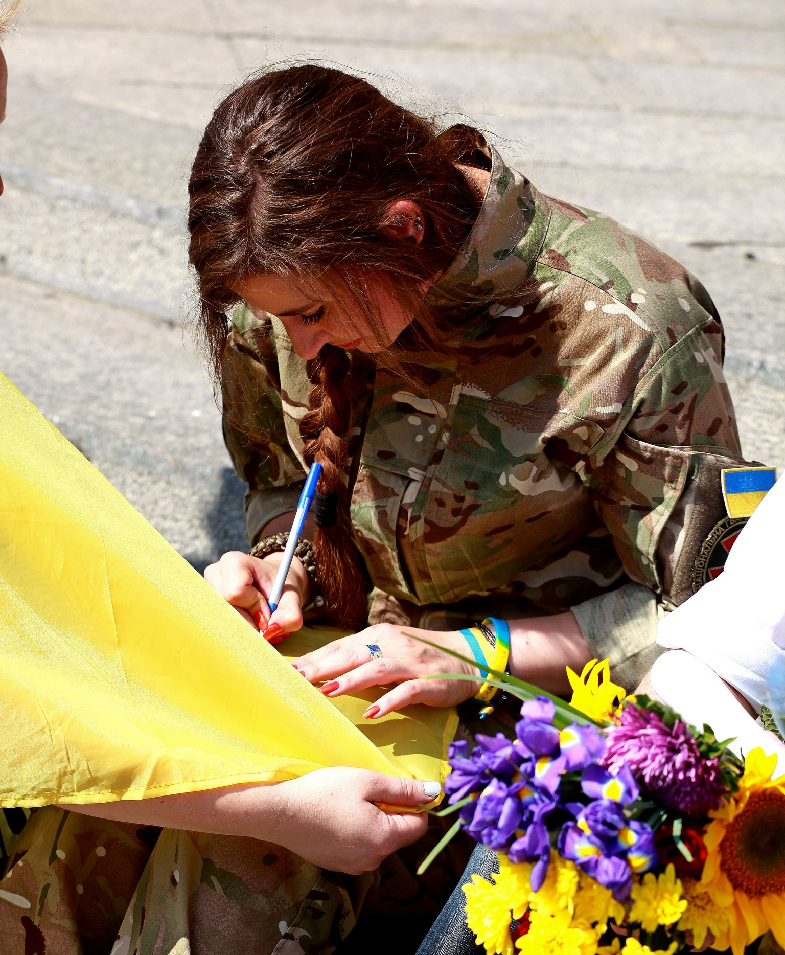 День Незалежності України 2015